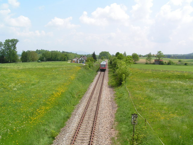 Bahnstrecke Richtung Fridolfing, 18 km von Traunstein, Deutschland (Zone 33). Die Bahnstrecke Mühldorf–Freilassing ist bis auf wenige Bahnhöfe nur eingleisig und ohne Elektrifizierung.